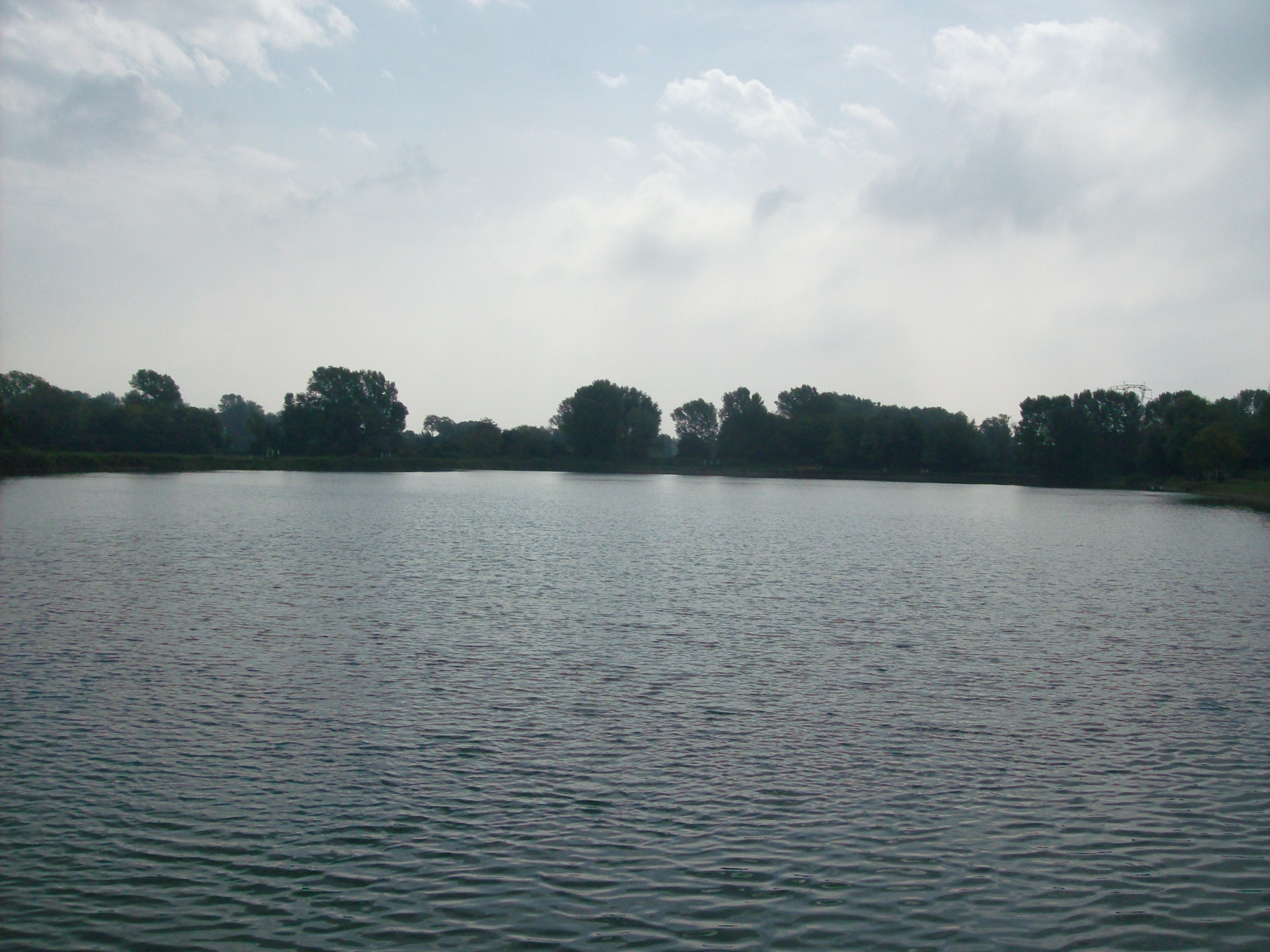 Lago dei Cigni via Guascona 60 Milano